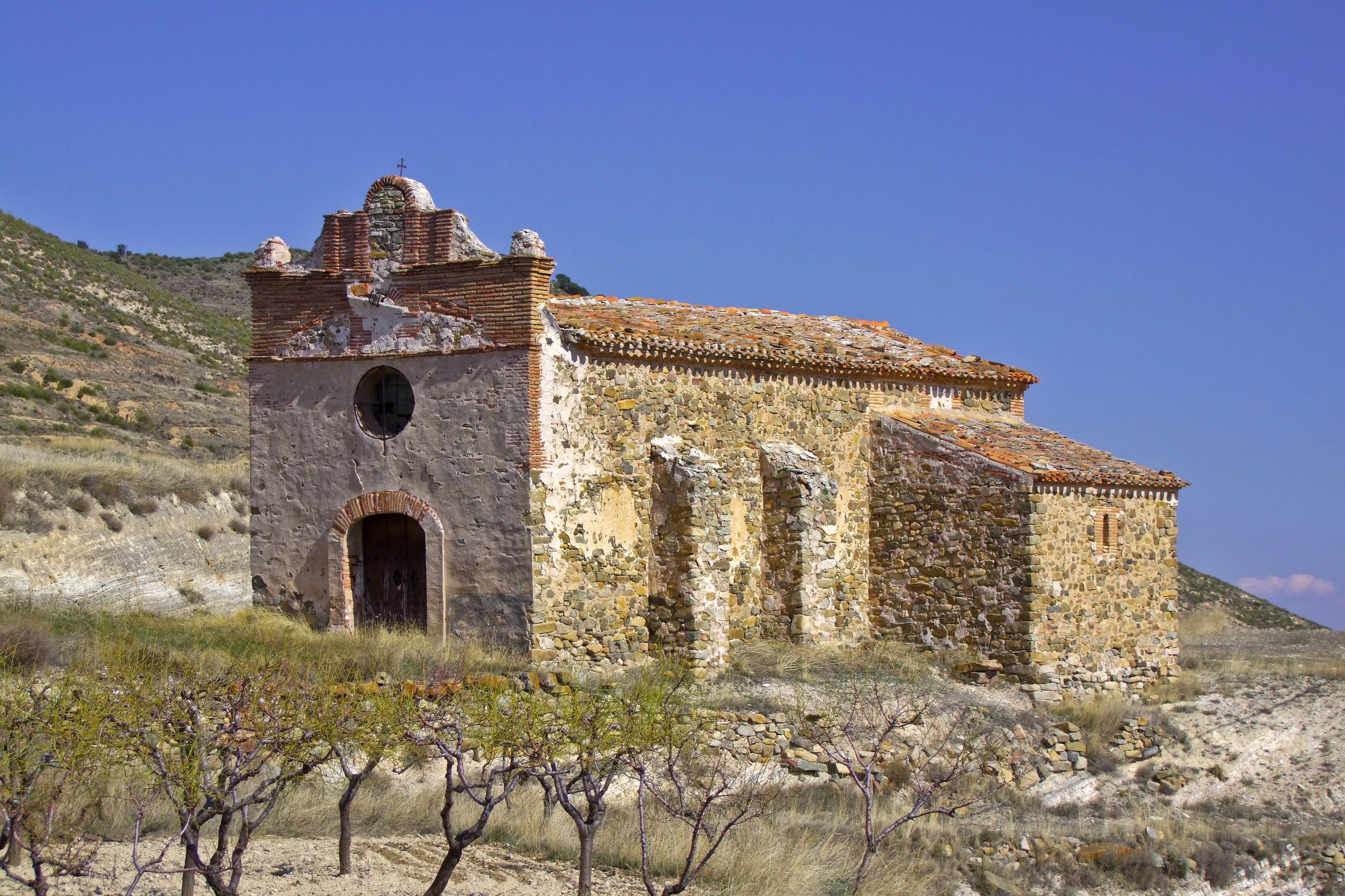 Ermita de San Pelayo en la localidad de Valdemadera, La Rioja - España